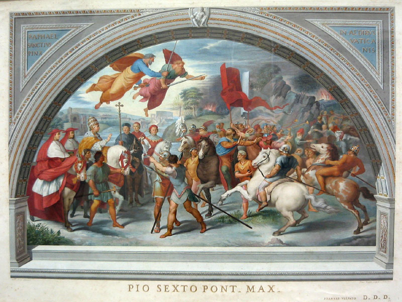 Leone e Atilla (de Raphaël) Gravure au trait. 56 x 74 cm